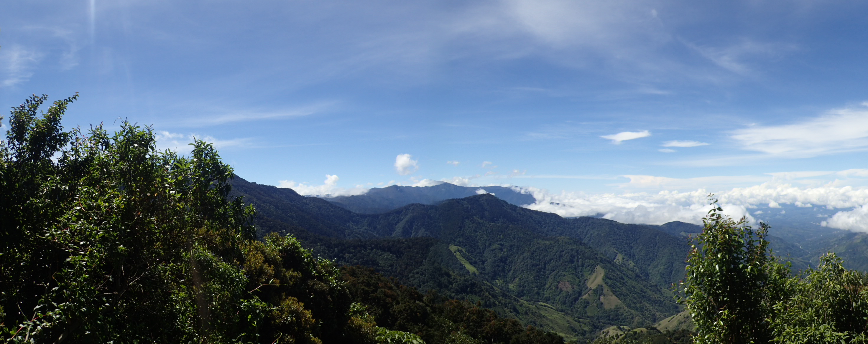 Cordillera de Talamanca. Estación Biológica Cuericí. 2850 m.s.n.m.